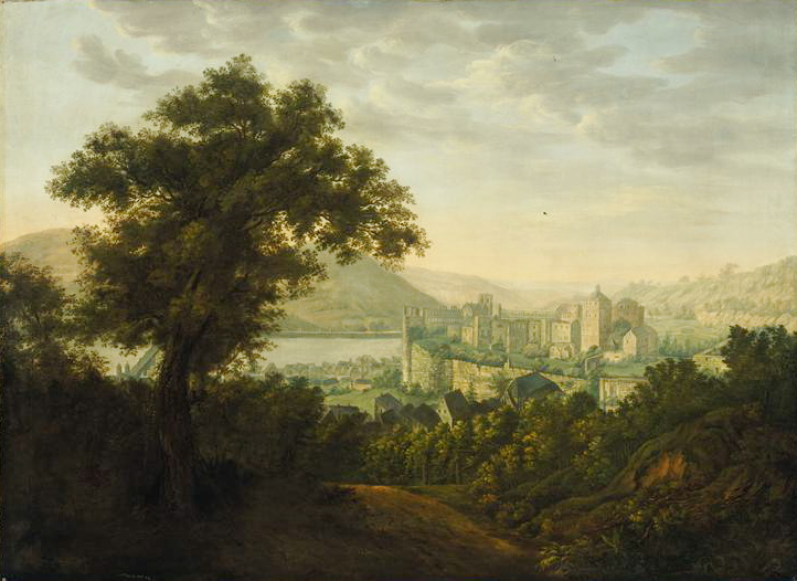 Heidelberg Castle